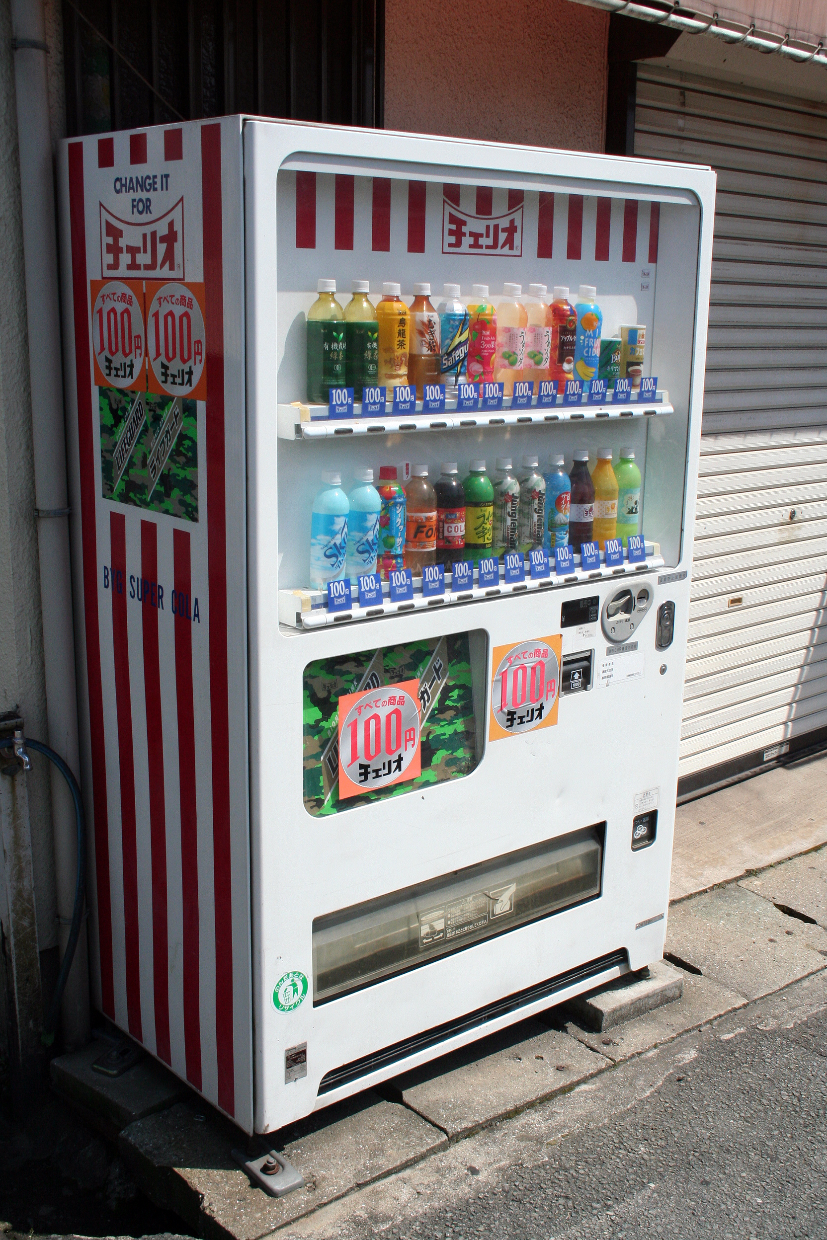 チェリオの自動販売機。